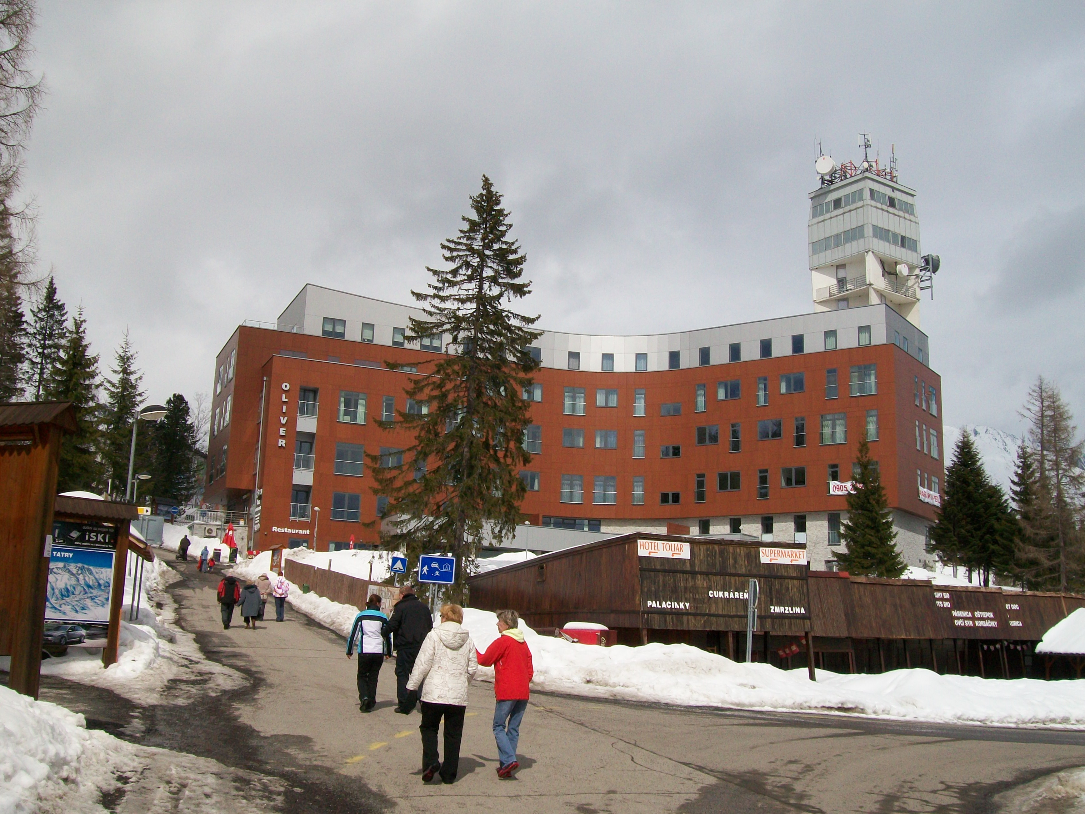 Apartmány OLIVER v Štrbskom Plese